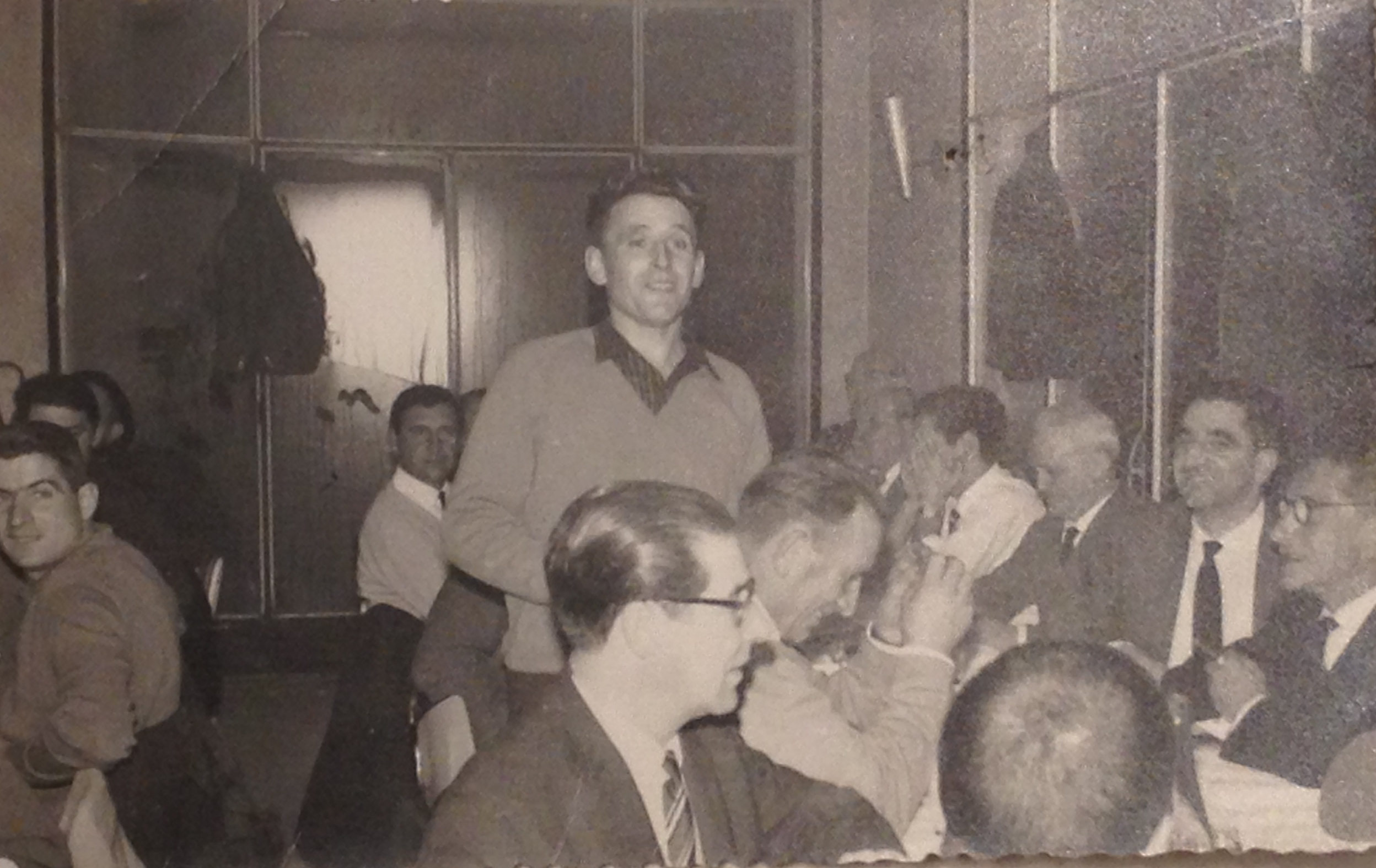 Manuel Matxain lagunartean bertsotan